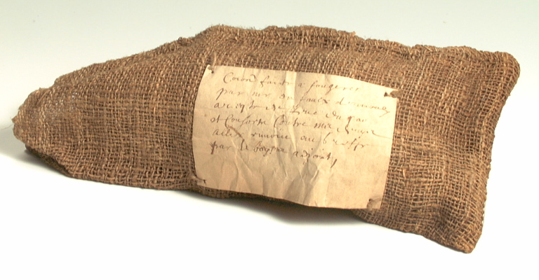 Sac de procédure du XVIIe siècle provenant du Parlement de Bretagne. Jusqu'à la révolution française, les pièces de procédure sont conservées dans des sacs de jute suspendus à des crochets.